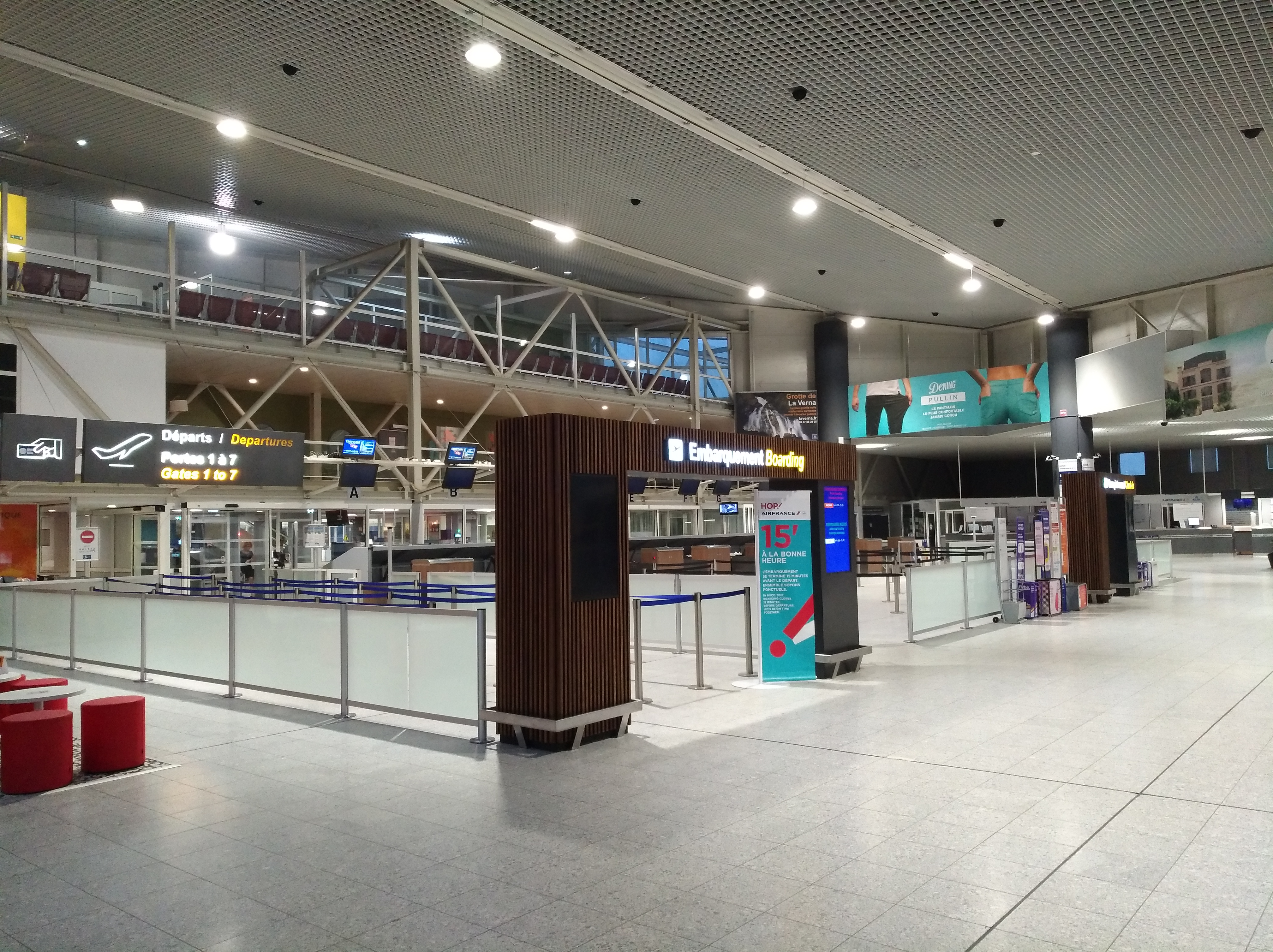 Vue de l'intérieur du hall de l'aéroport de Biarritz-Pays basque, situé sur la commune d'Anglet (Pyrénées-Atlantiques, France).